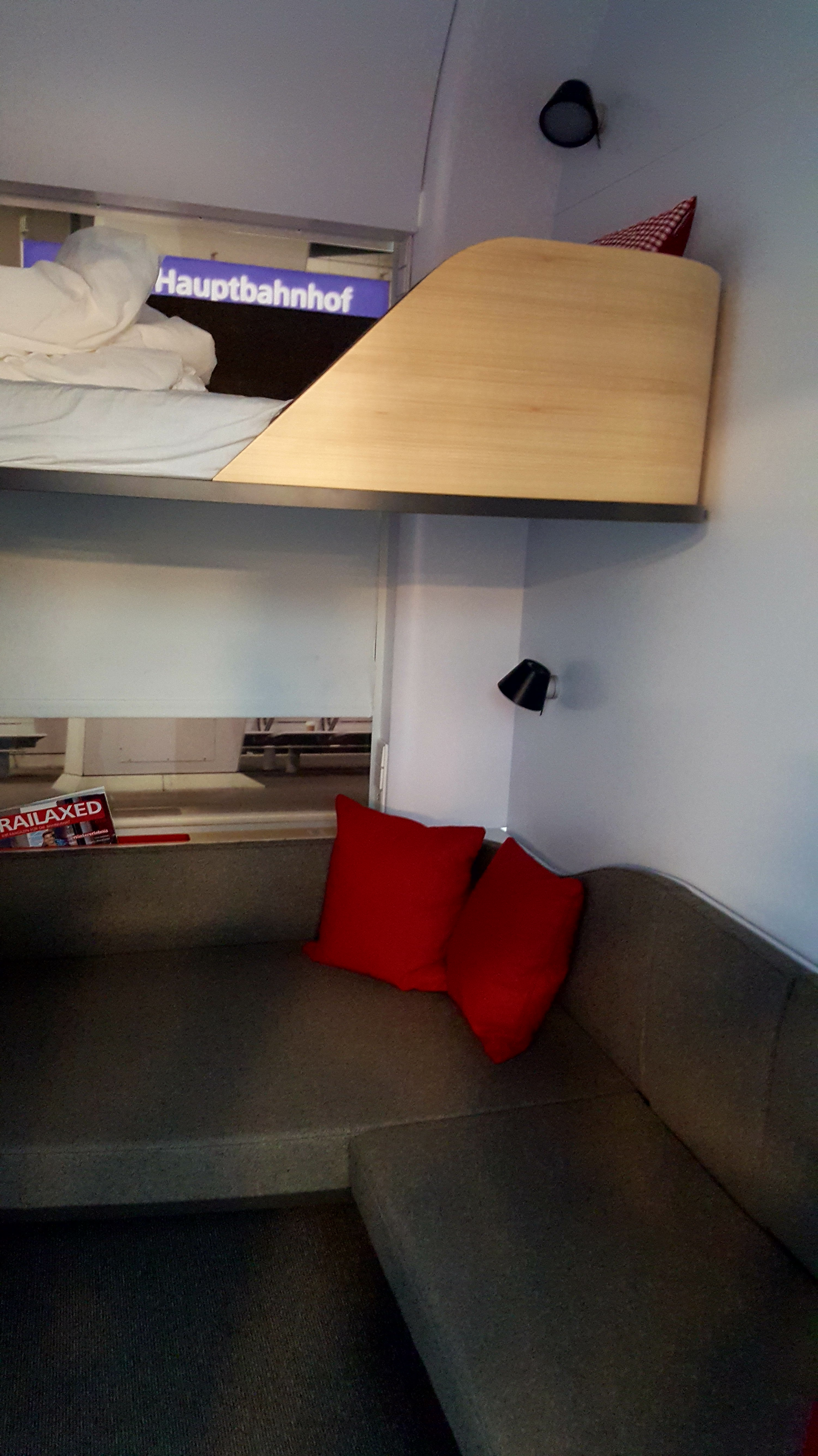 Modell der neuen Schlafwagenabteile im ÖBB Nightjet